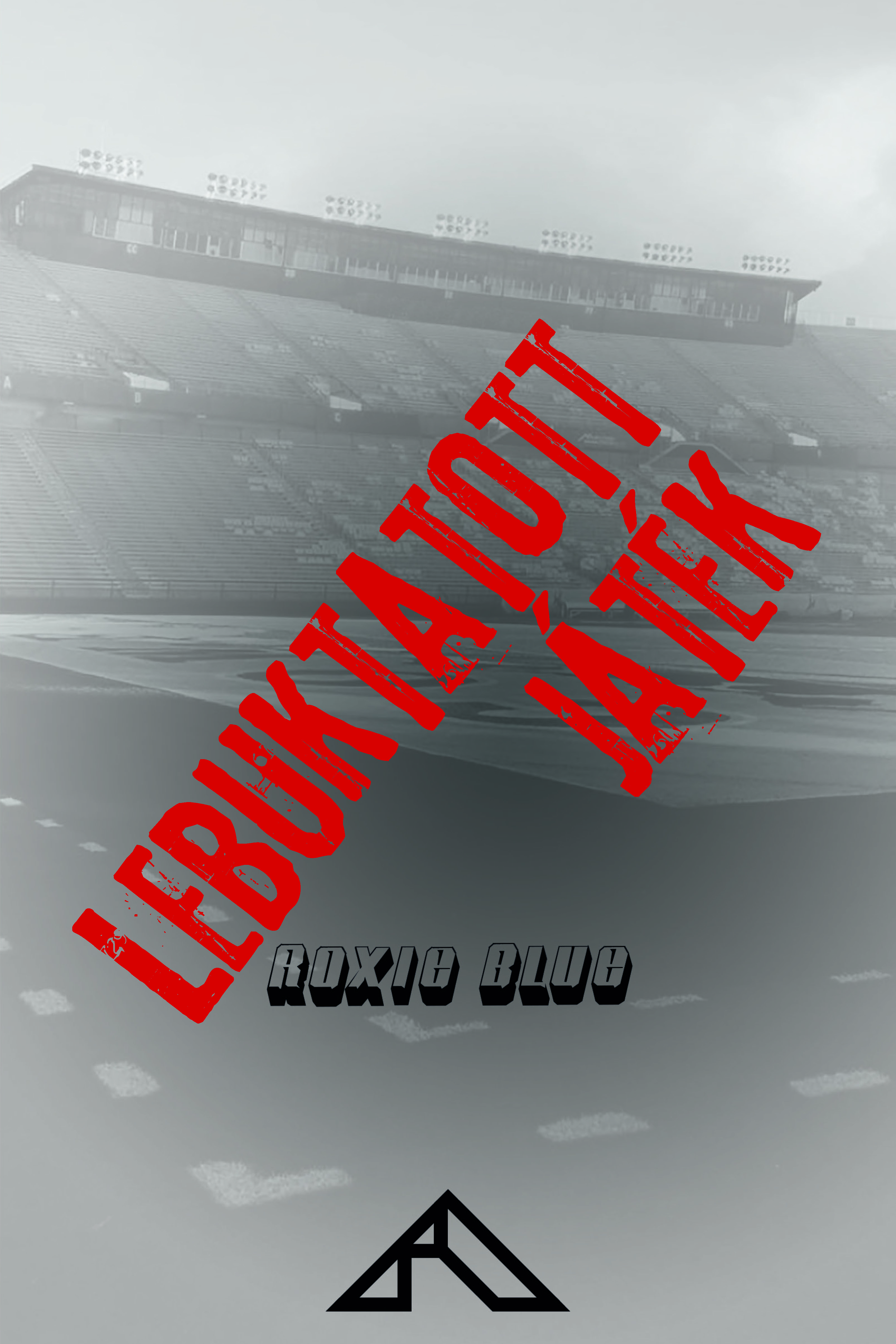 Roxie Blue Lebuktatott játék című könyvének borítója.